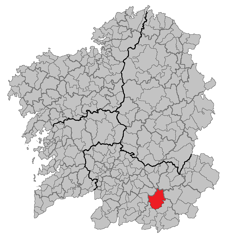 Mapa coa localización do concello de Laza.